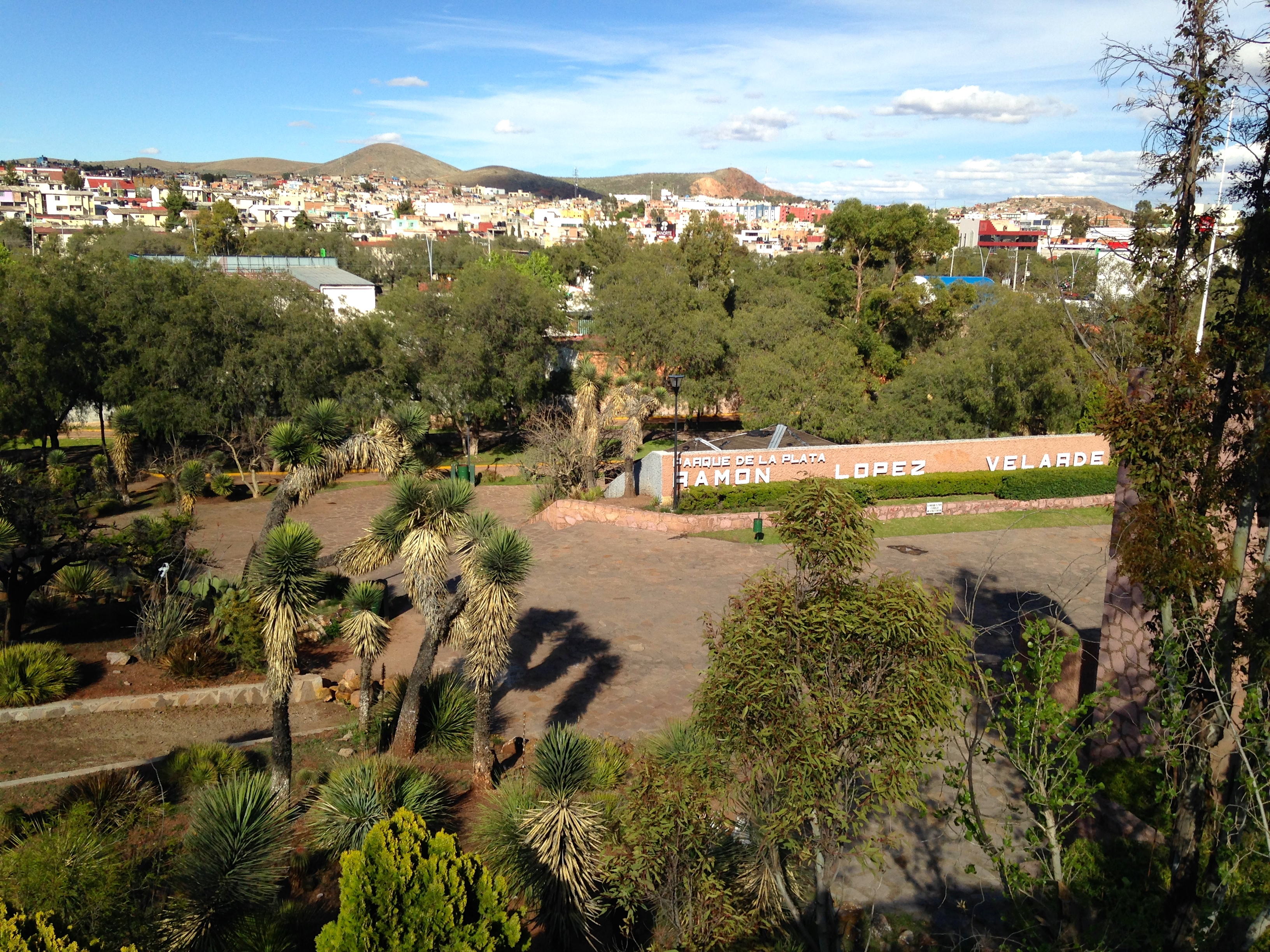 Parque Arroyo de la Plata, ubicado en la zona conurbada Zacatecas-Guadalupe